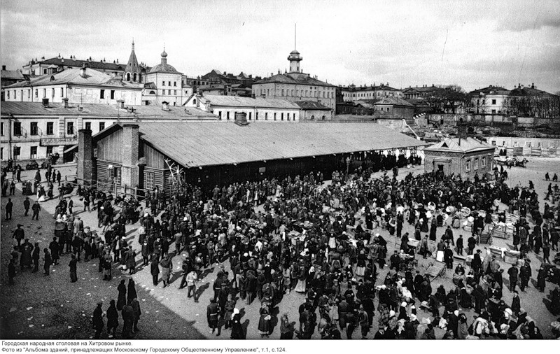 124. Биржа труда и Городская народная столовая на Хитровомъ рынкЪ.